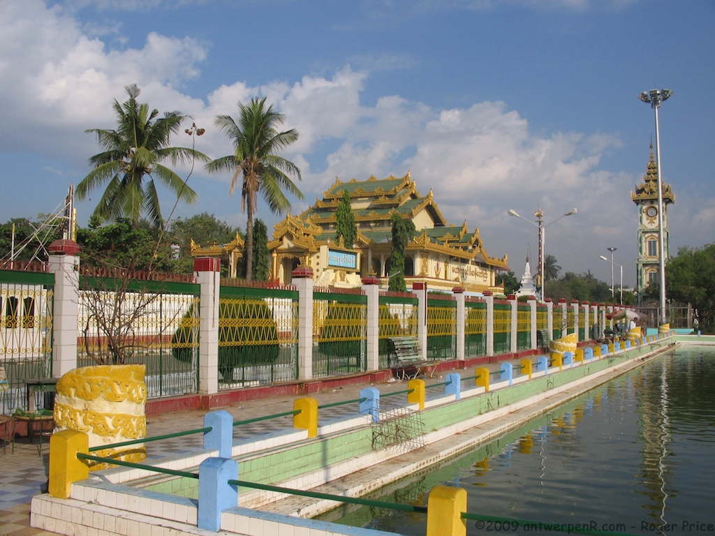 Mandalay, Myanmar - Burma